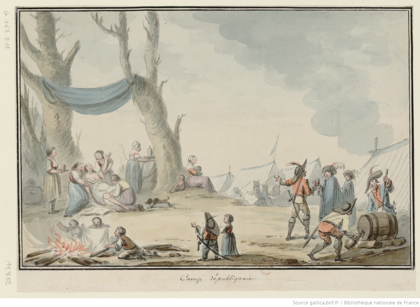 Trois groupes : cinq très jeunes enfants jouant autour d’un feu ; cinq femmes entourant une autre en train d’accoucher sous un arbre tandis qu’une septième berce son propre nourrisson ; cinq soldats en train de trinquer, semble-t-il pour fêter l’heureux événement.